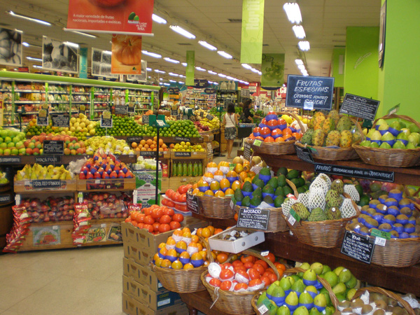 Brazilian supermercado in São Paulo